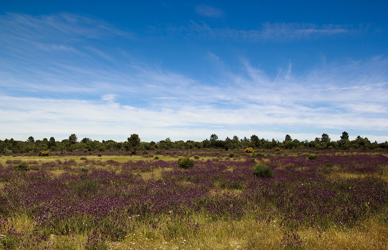 Embora para lá paisagem difira um pouco, a verdade é que na raia temos um misto de beleza e diversidade no meio da melancolia que traz o abandono de algumas terras... Fotografia tirada na estrada nacional 233-3 próximo de Vilar Formoso